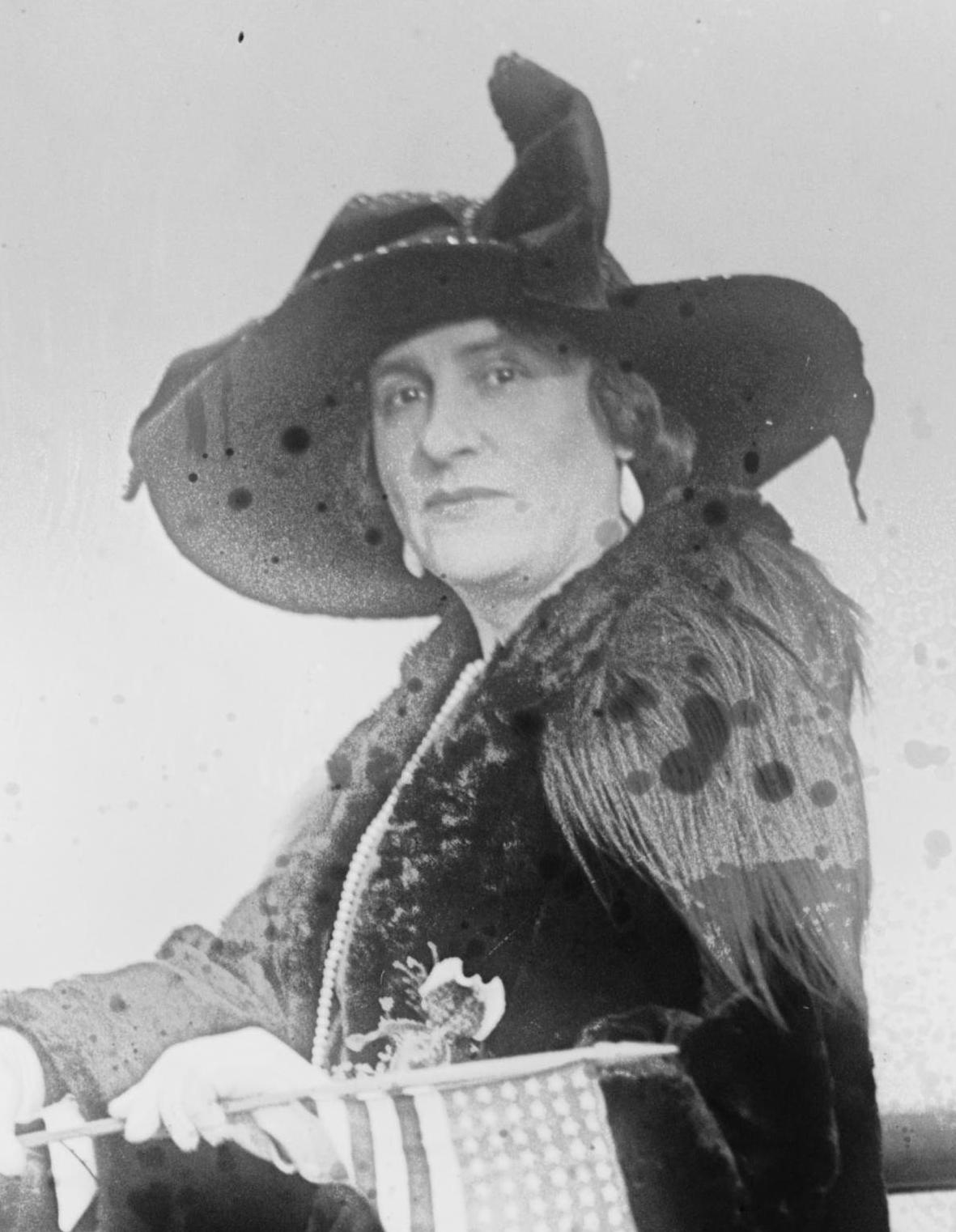 Florence Auer